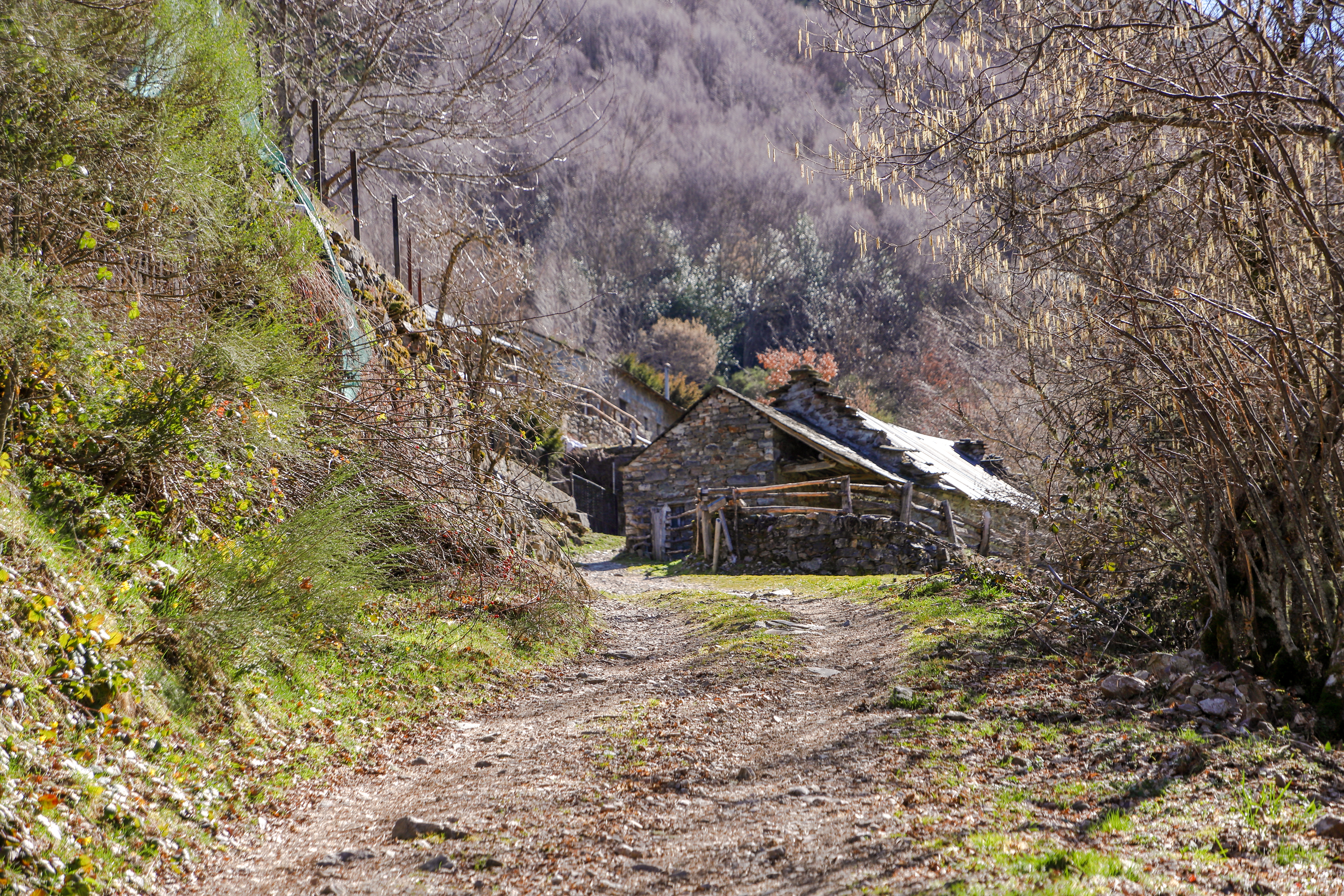 Mataotero es una localidad que pertenece al municipio de Palacios del Sil, en la comarca de El Bierzo, provincia de León.